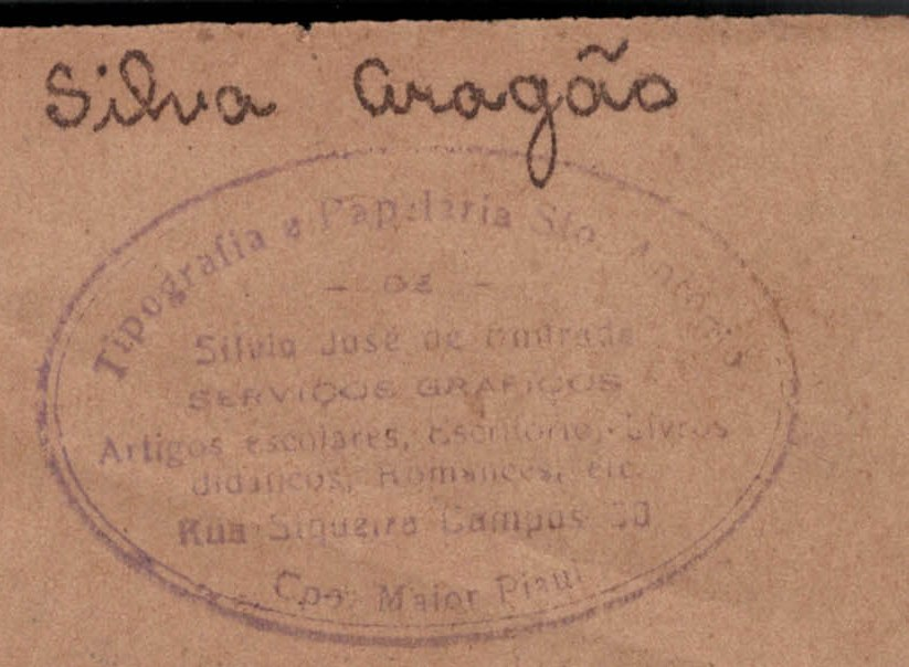 Carimbo de uma tipografia e papelaria que existiu em Campo Maior, no Piauí.